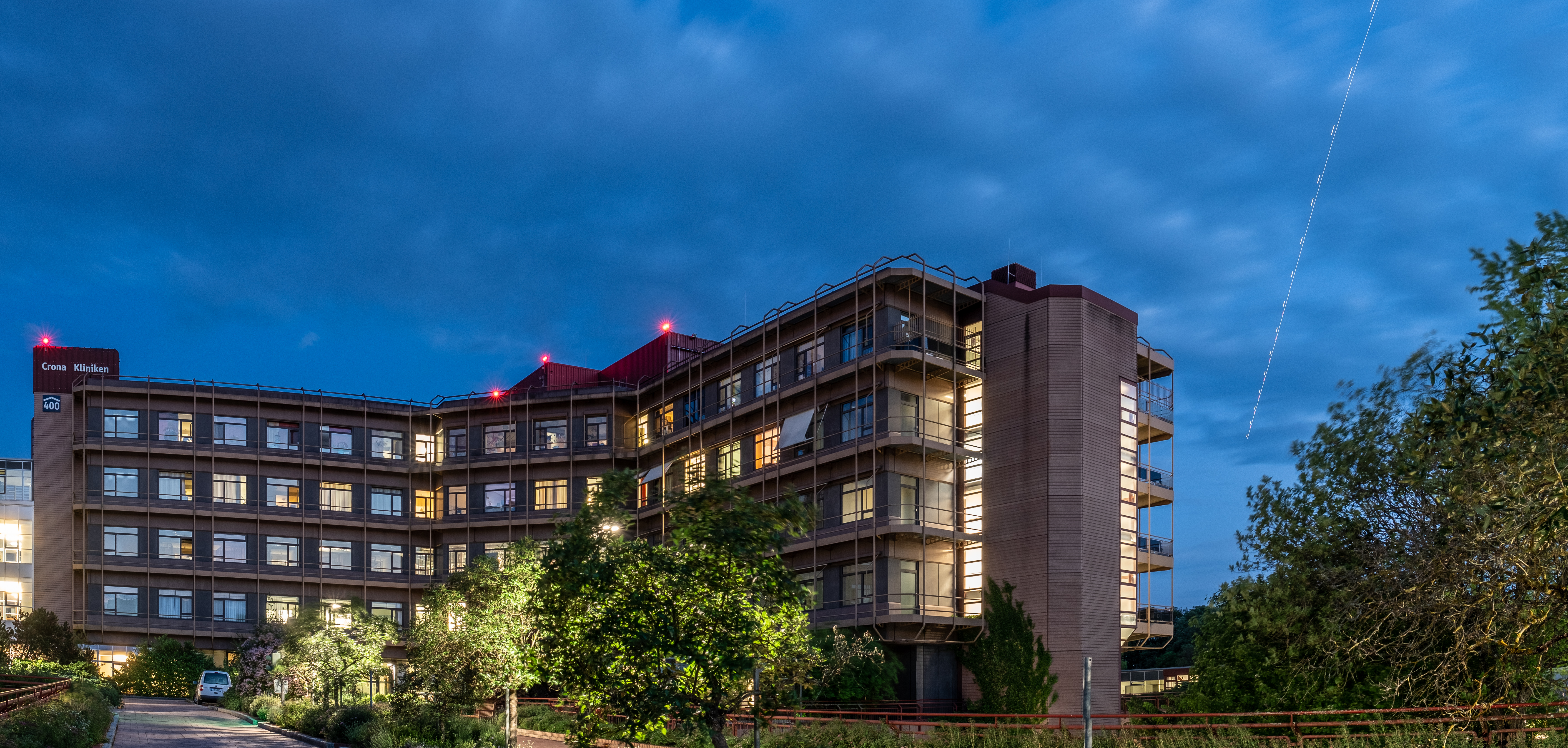 Tübingen. Langzeitbelichtung der Crona-Kliniken mit Rettungshubschrauber